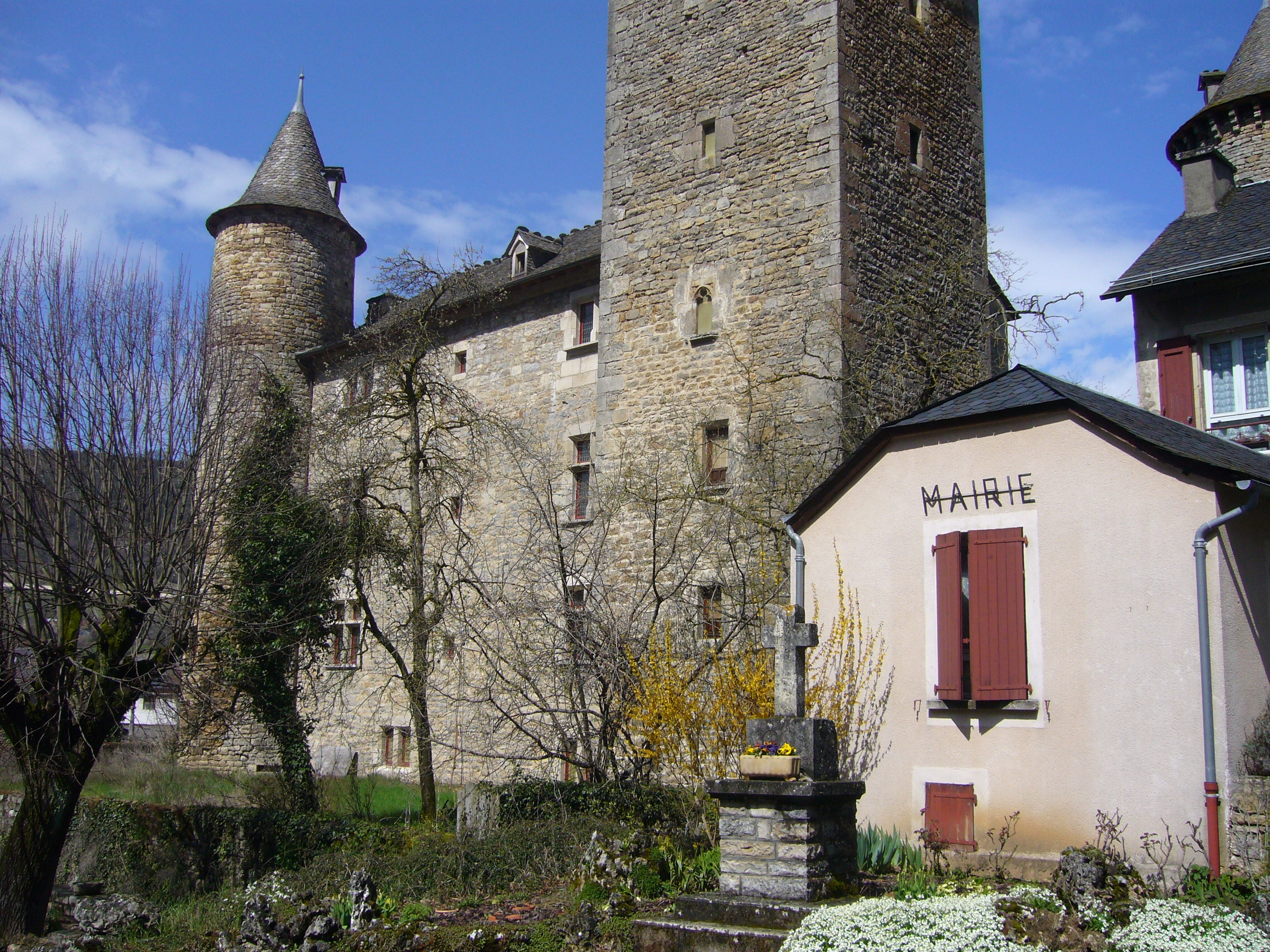 Le village de Saint-Saturnin, Lozère, France